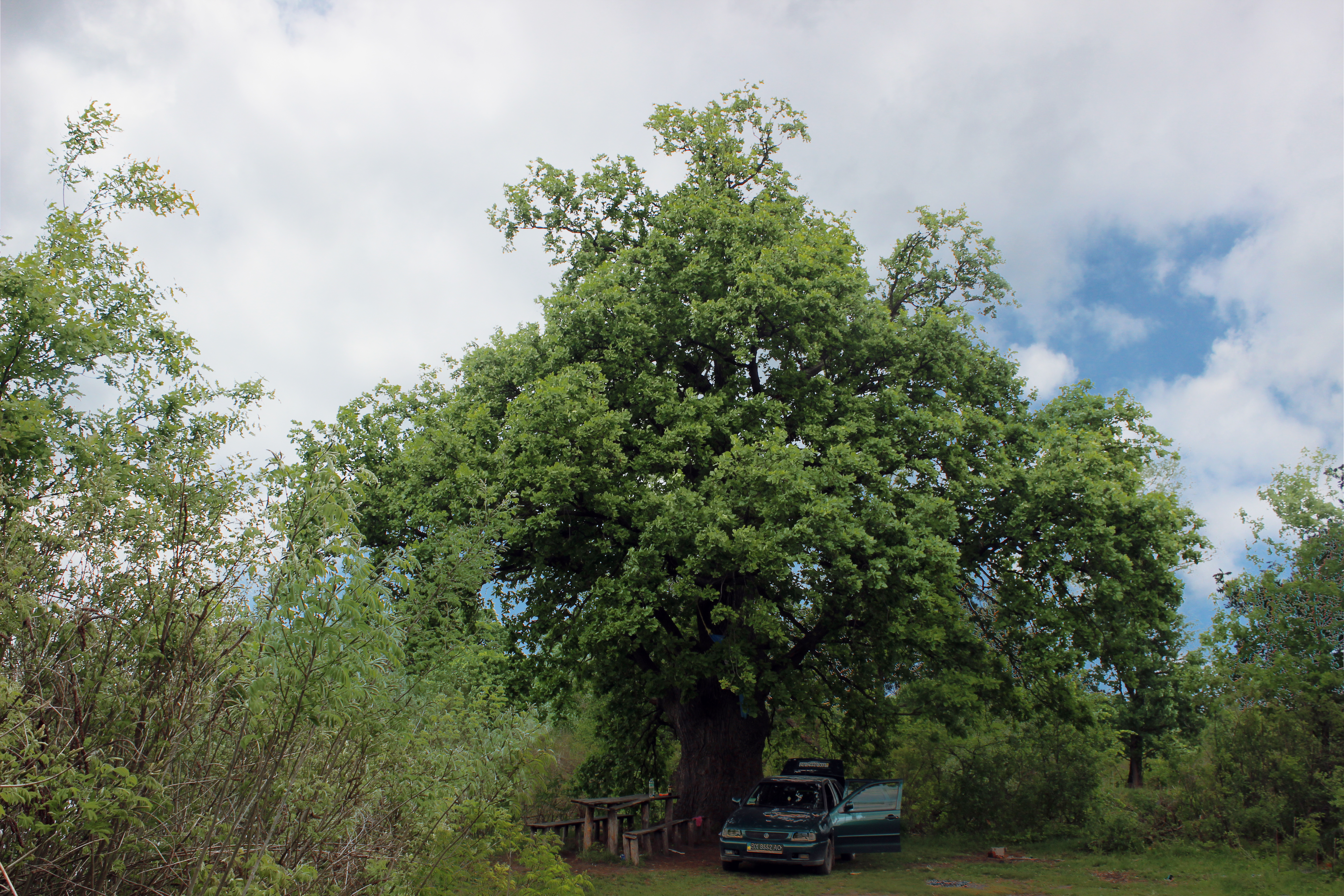 Дуб на синій воді, Голосіївський район, в межах ландшафтного заказника «Жуків острів». Найпівнічніша точка острова на р. Віта. Дорога з вул. Лісничої у напрямку комплексу відпочинку «Маячок». Не переходити дамбу, в кінці якої дуб "Знак оклику", а звернути вліво на грунтівку